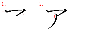 Orden de los trazos de ア. Imagen creada por mí.Categoría:Kana (imagen)